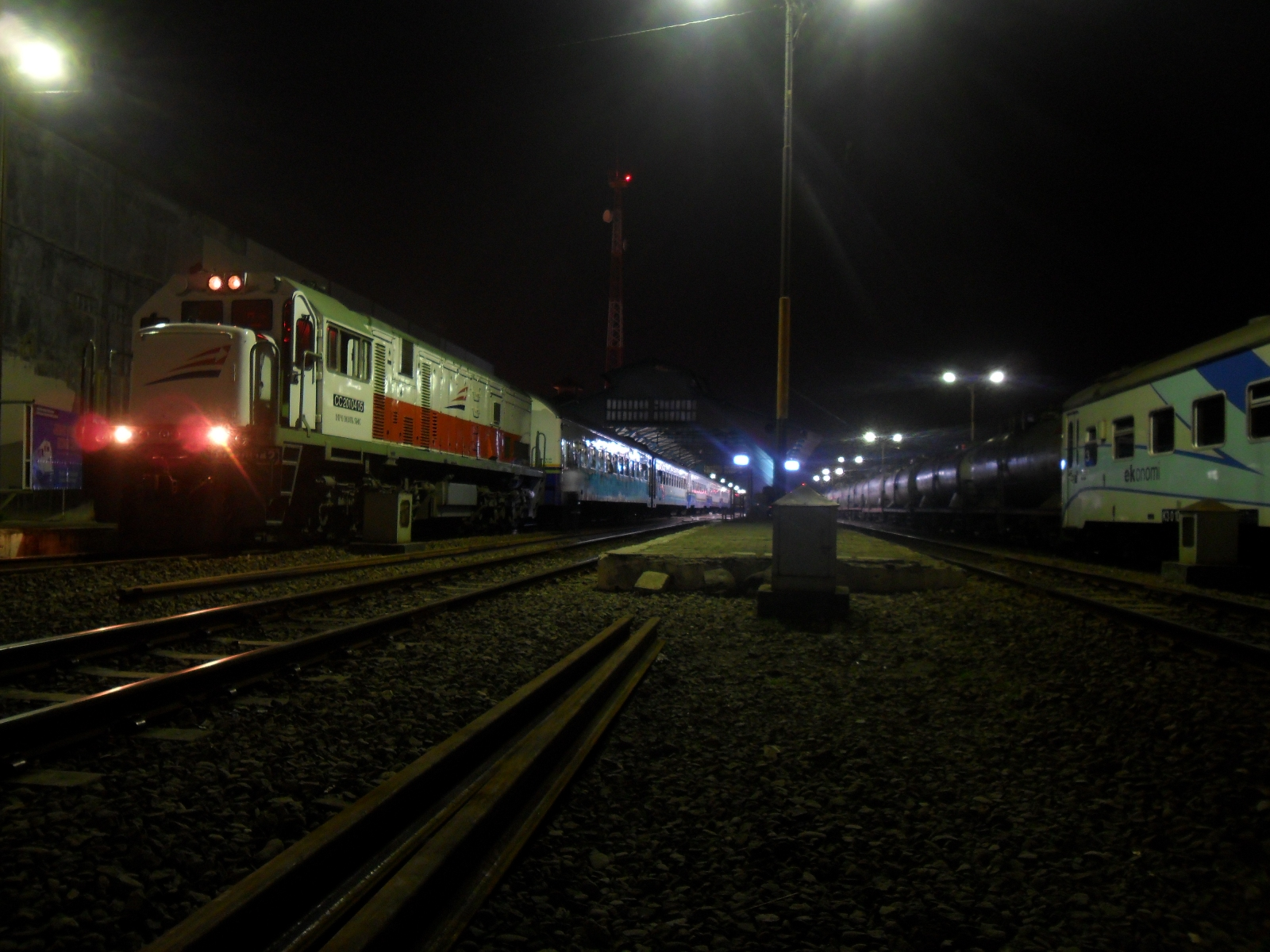 KA Senja Utama Semarang di Stasiun Tegal